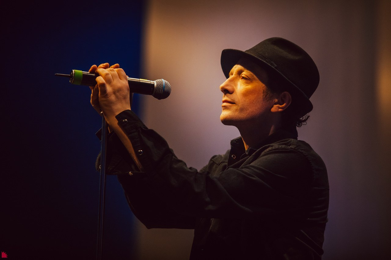 Выступление The Matrixx в Екатеринбурге, 2017 г.